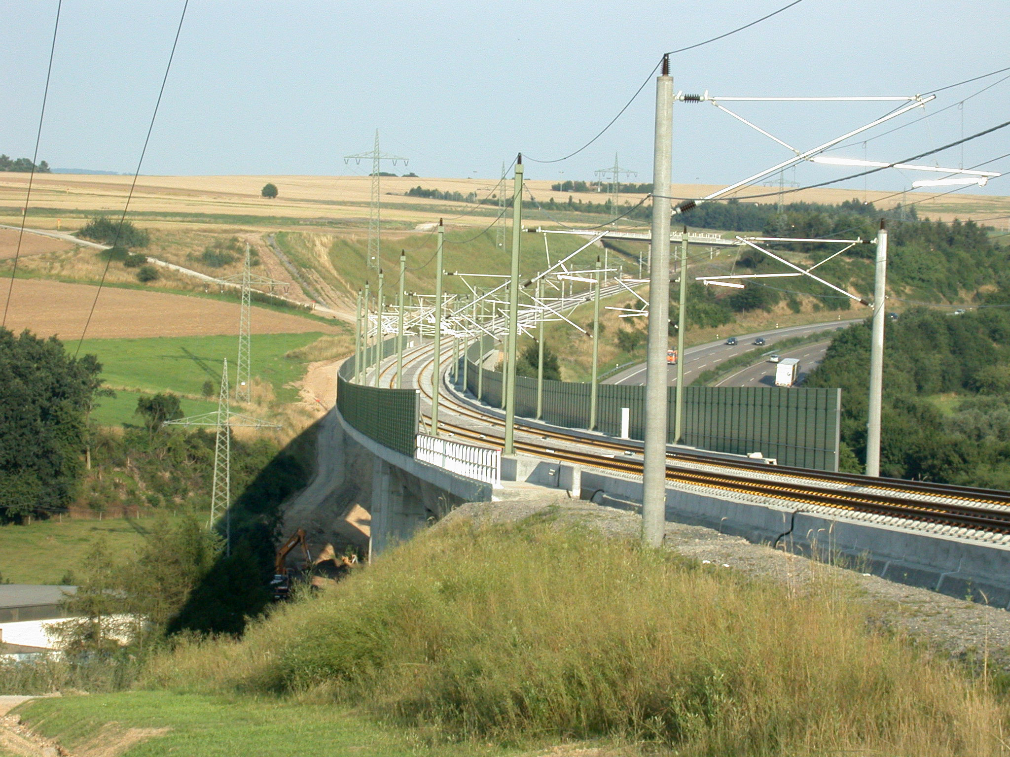 ICE-Brücke Wörsbachtal, Brechen, Deutschland